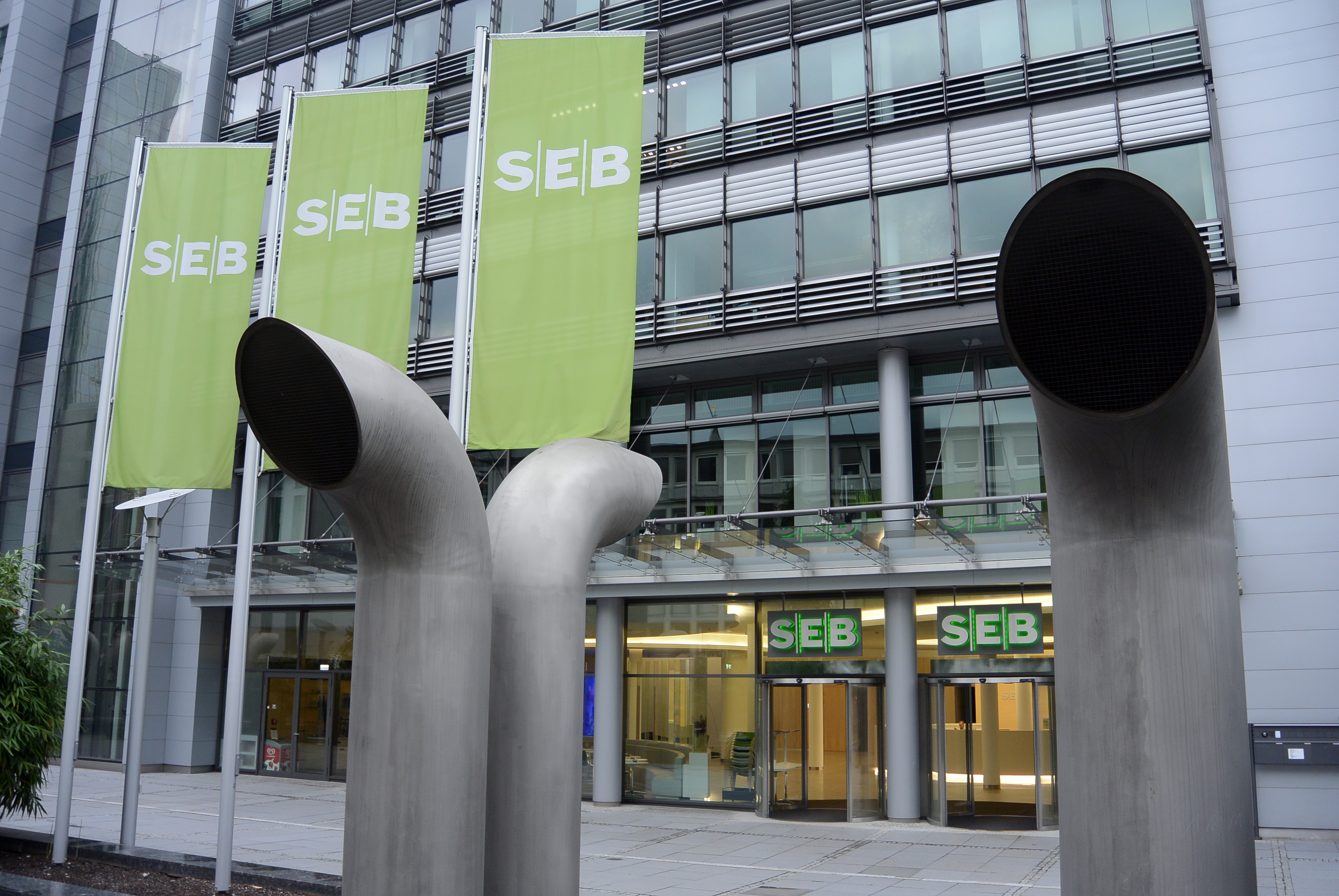 Halböffentlicher Bereich als Passage mit EIngang der SEB-Bank, Frankfurt